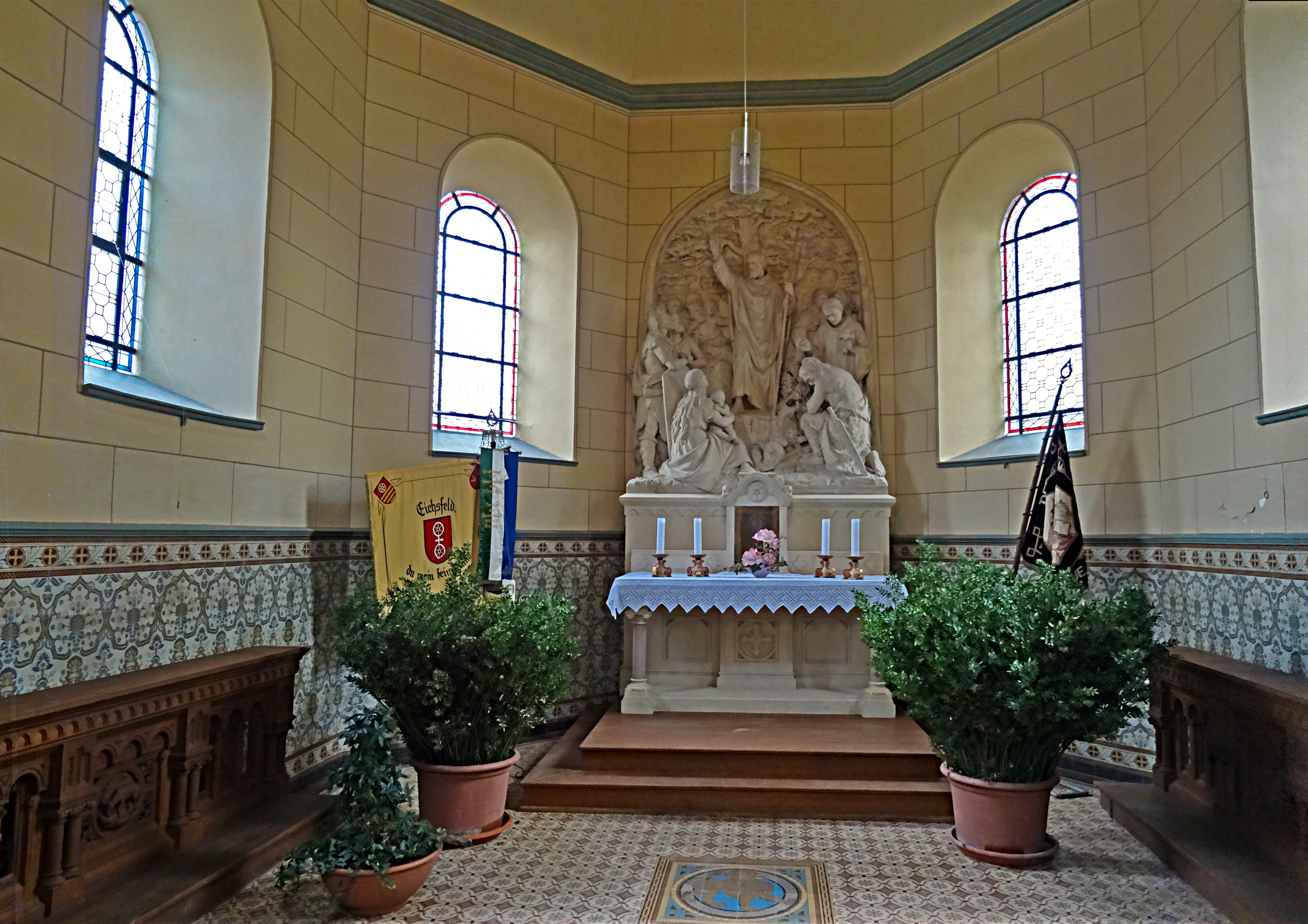 Innenraum der Bonifatiuskapelle auf dem Hülfensberg